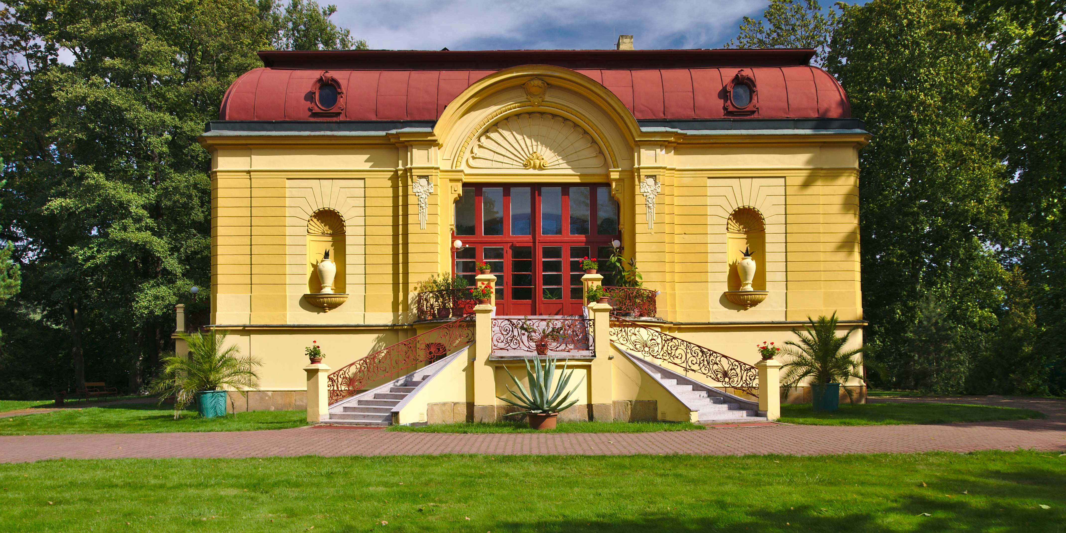 Malá vila továrníka Löw-Beera, Svitávka, okres Blansko